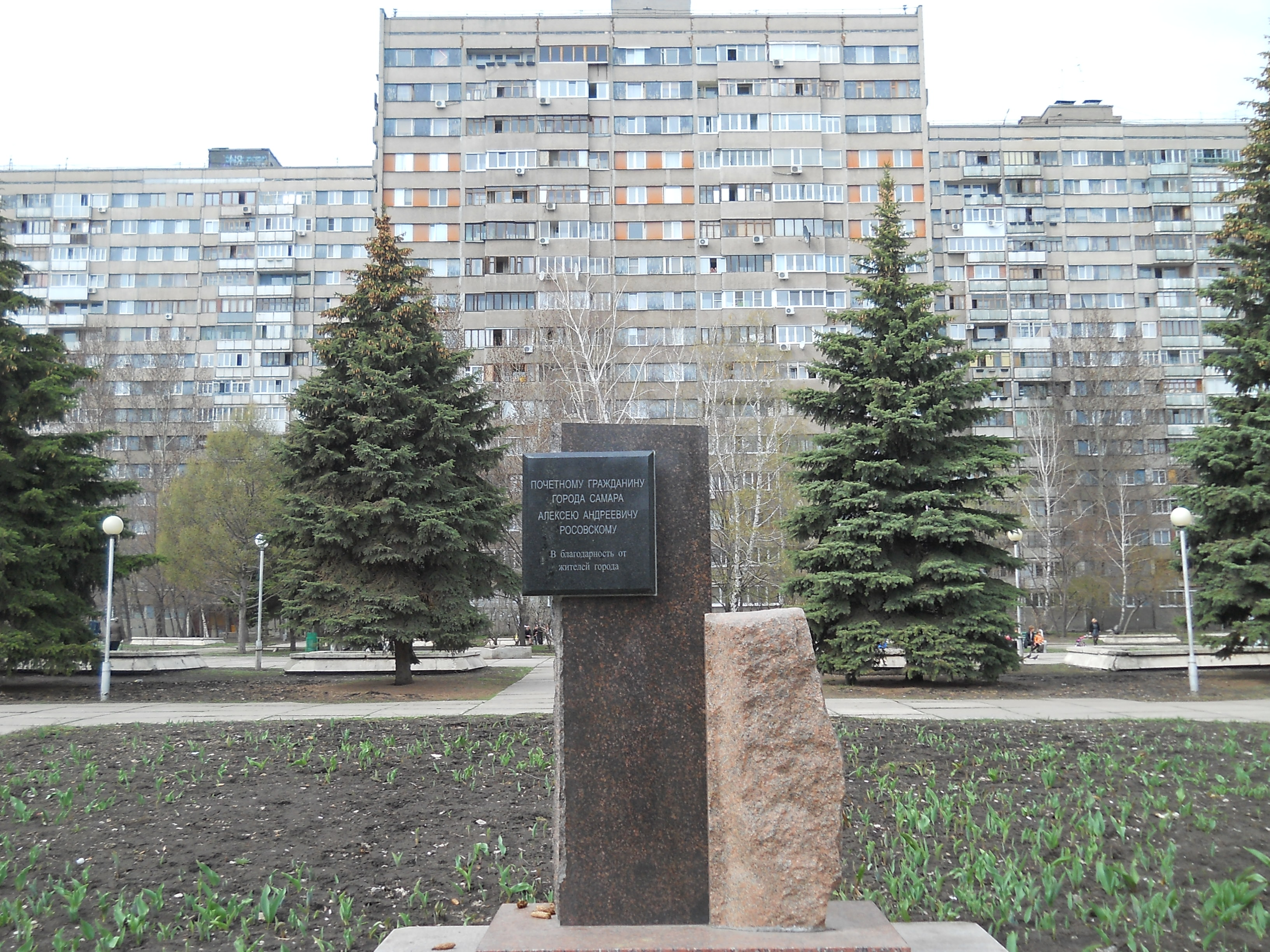 Стела почетному гражданину Самары Росовскому Алексею Андреевичу.